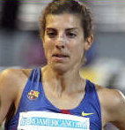 La atleta española Sonia Bejarano